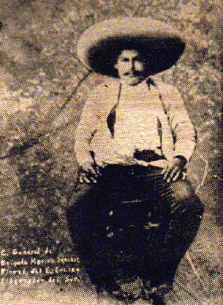 El Gral. Marino Sánchez fue un militar mexicano que participó en la Revolución Mexicana. Nació en las cercanías de Tlayacapan, Morelos.